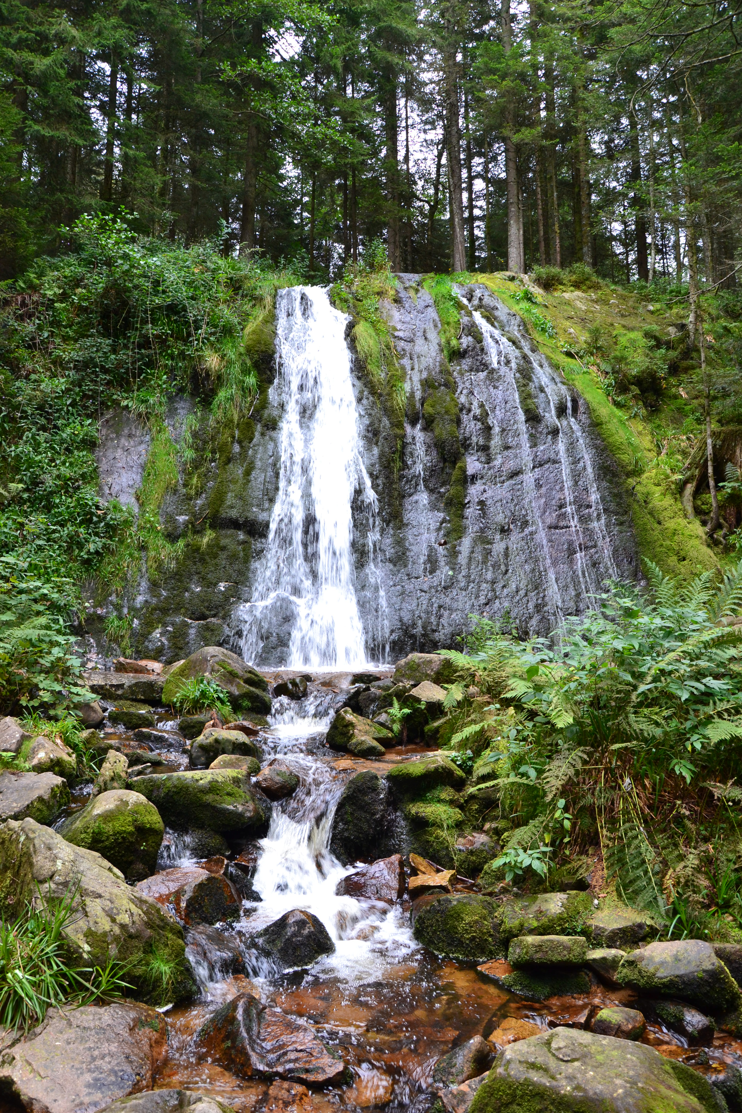 Cascade de la Pissoire, le Haut du Tôt, Vagney